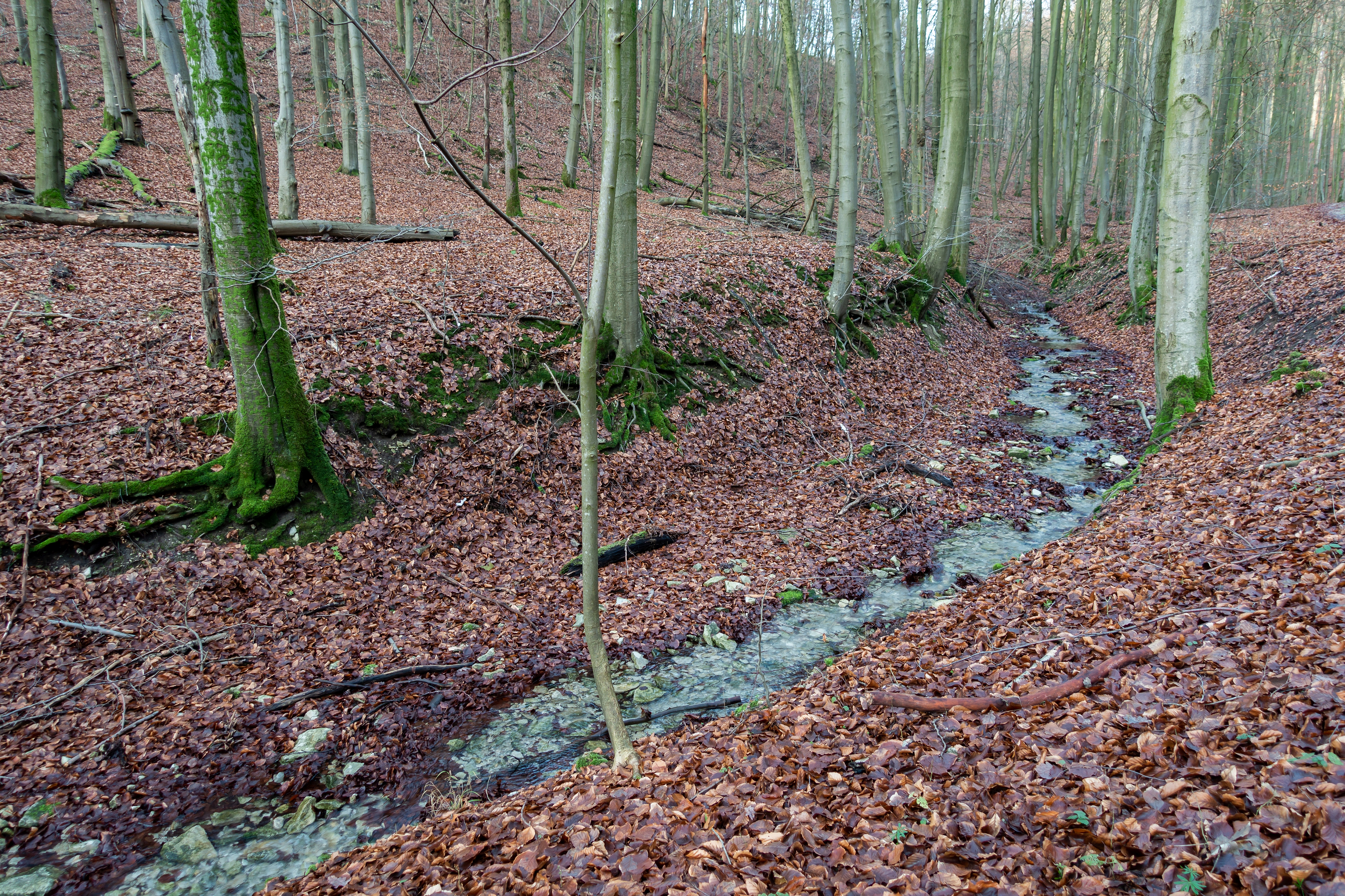 Naturwaldzelle Ochsenberg im Naturschutzgebiet Egge-Nord in Altenbeken, Kreis Paderborn; unbenannter linker Zufluss der Durbeke